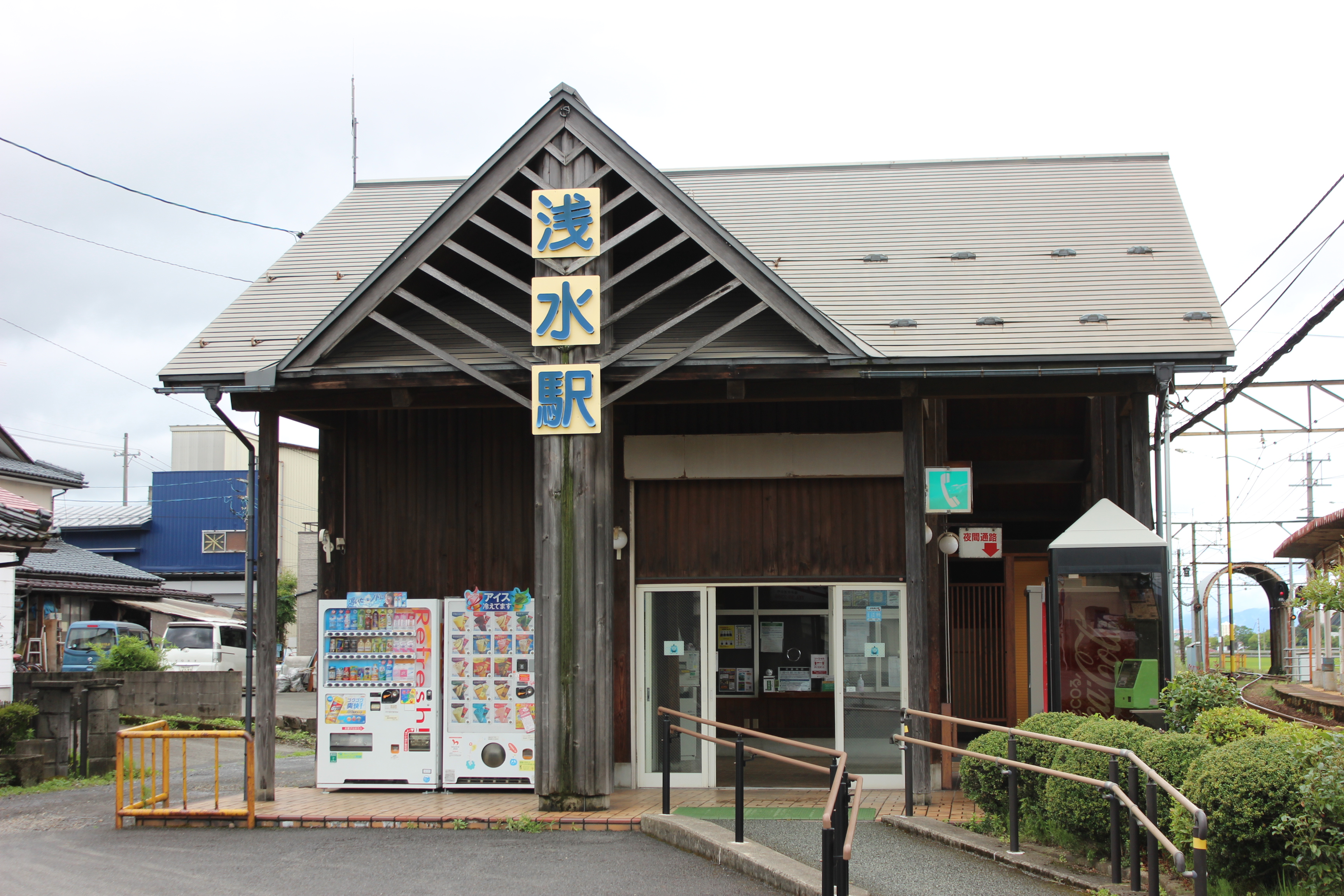 浅水駅（福井県福井市） Canon EOS Kiss X5